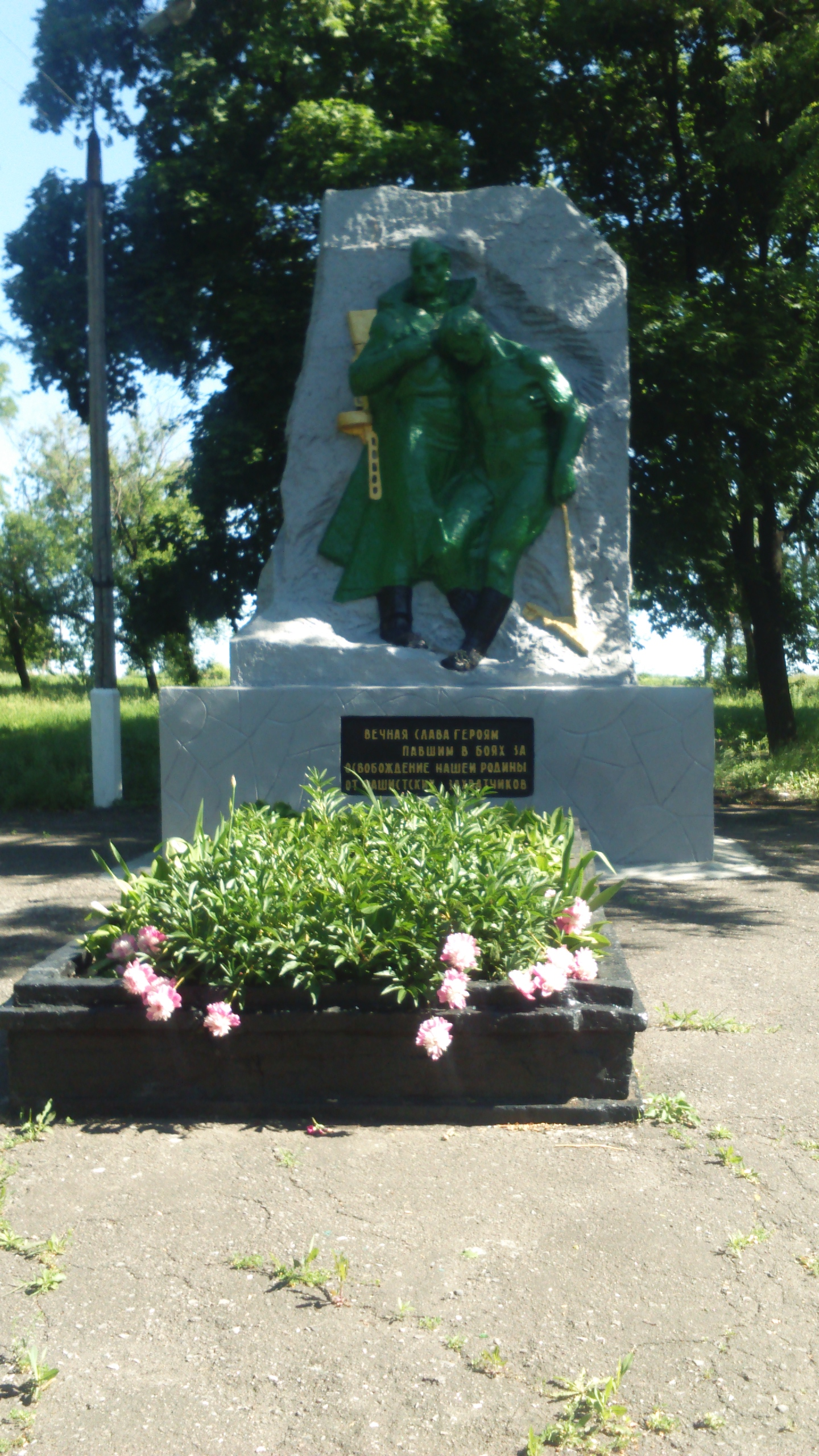 Водя́нське — селище міського типу Донецької області, підпорядковане Білицькому, розташоване на річці Водяна за 93 км від Донецька. Відстань до райцентру становить близько 6 км і проходить автошляхом місцевого значення.